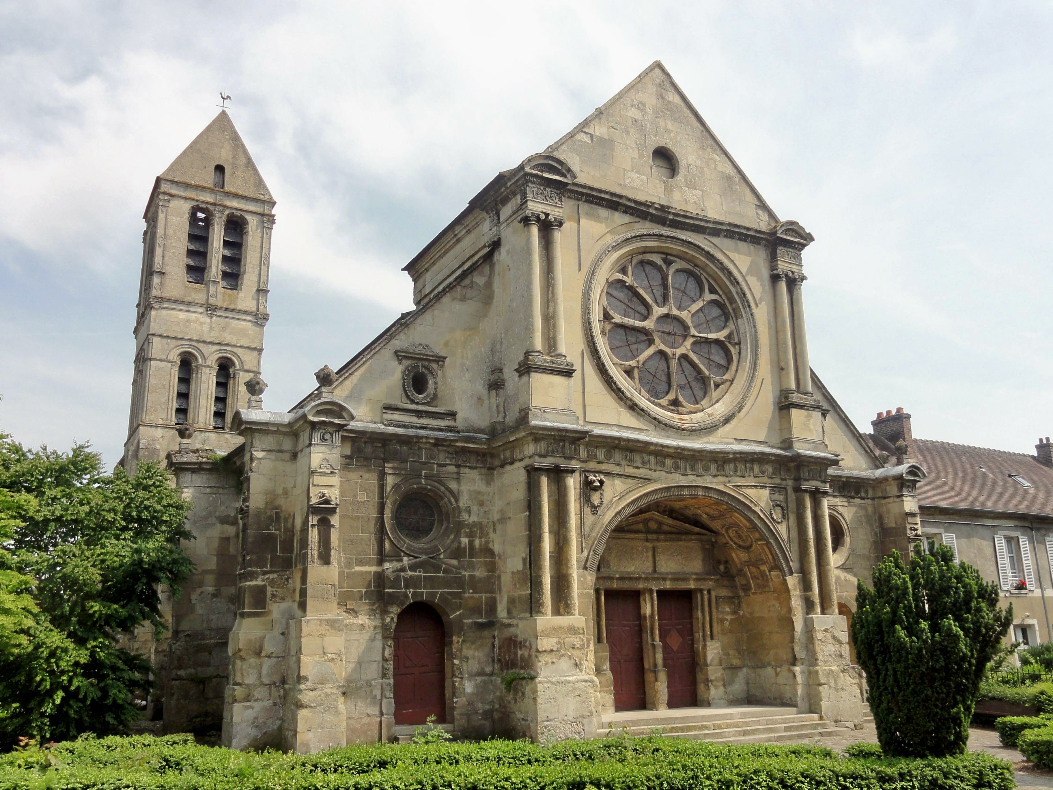 Façade occidentale.